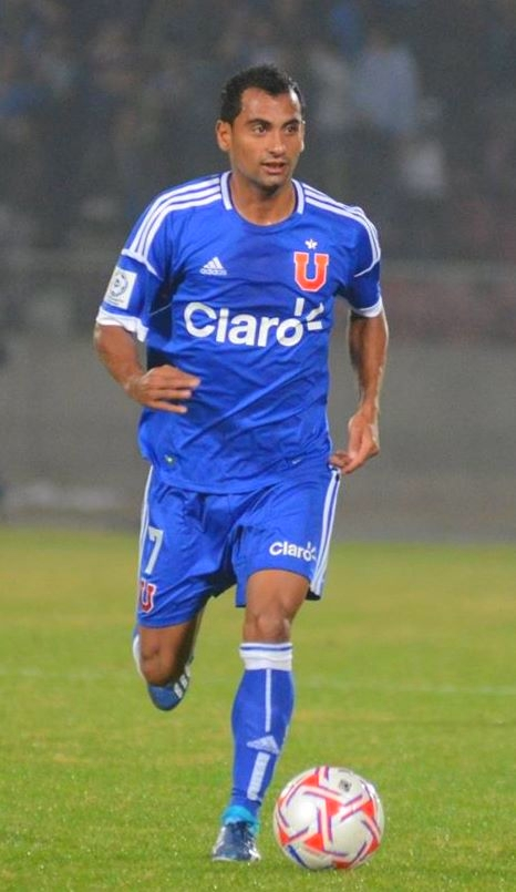 Jugador club Universidad de Chile